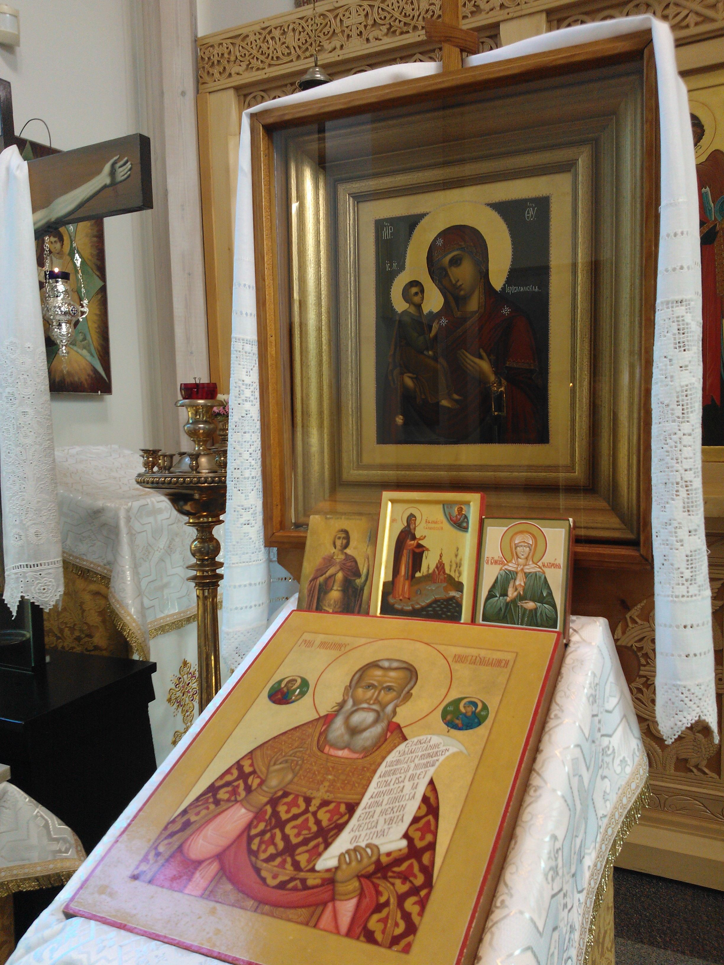 Линтульский монастырь, Финляндия